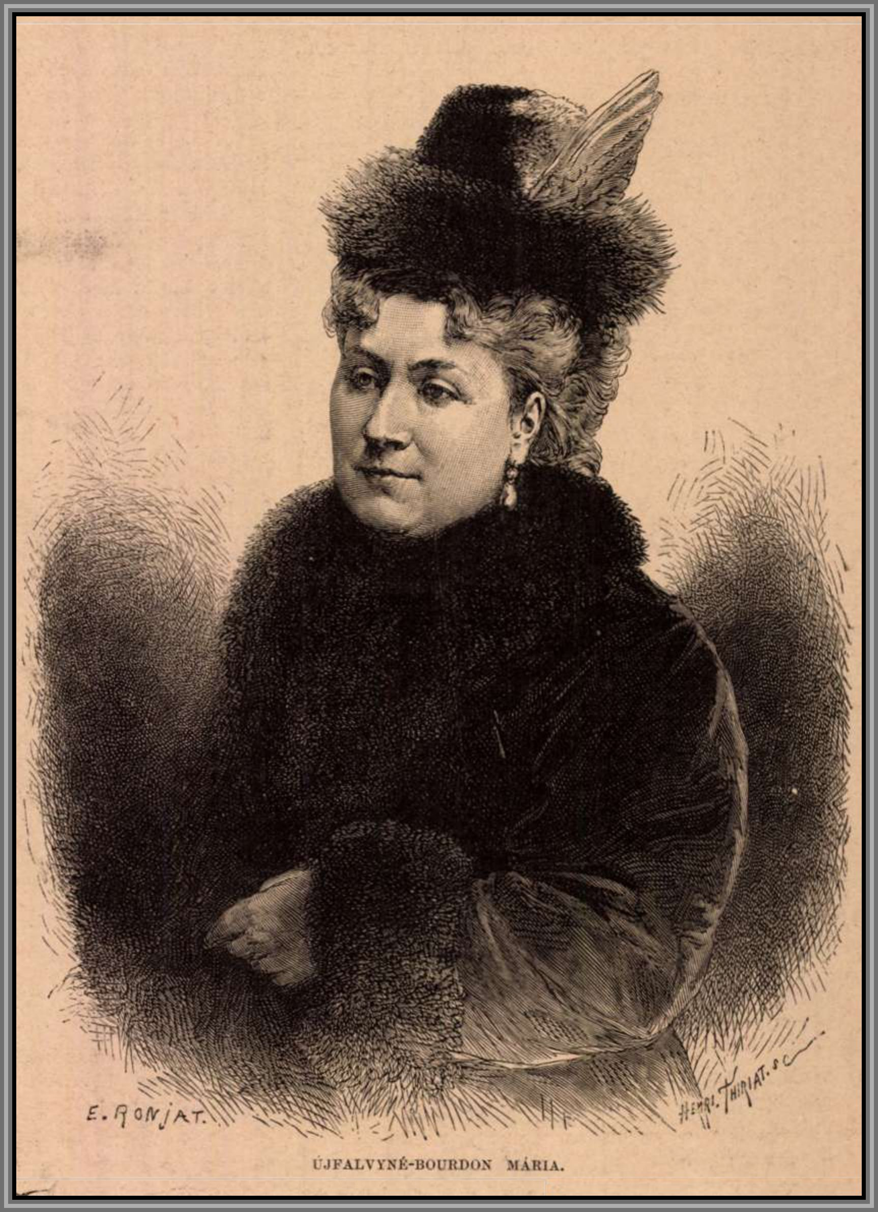 Ujfalvy Károlyné (Bourdon Mária), Ujfalvy Károly (Bécs, 1842. május 18. – Firenze, 1904. január 31.) Közép-Ázsia és Nyugat-Himalája néprajzi kutatója neje, kivel 1868-ban kelt össze; férjének hű kísérője volt utazásaiban; 1886-ban Budapestet is meglátogatták. Férjével együtt több évig Firenzében via Caldie palotájukban laktak, ahol 1904. szept. 1-jén olvasás közben kigyúlt az ágya és sebeiben pár perccel utóbb kiszenvedett. (Szinnyei: Magyar írók élete)